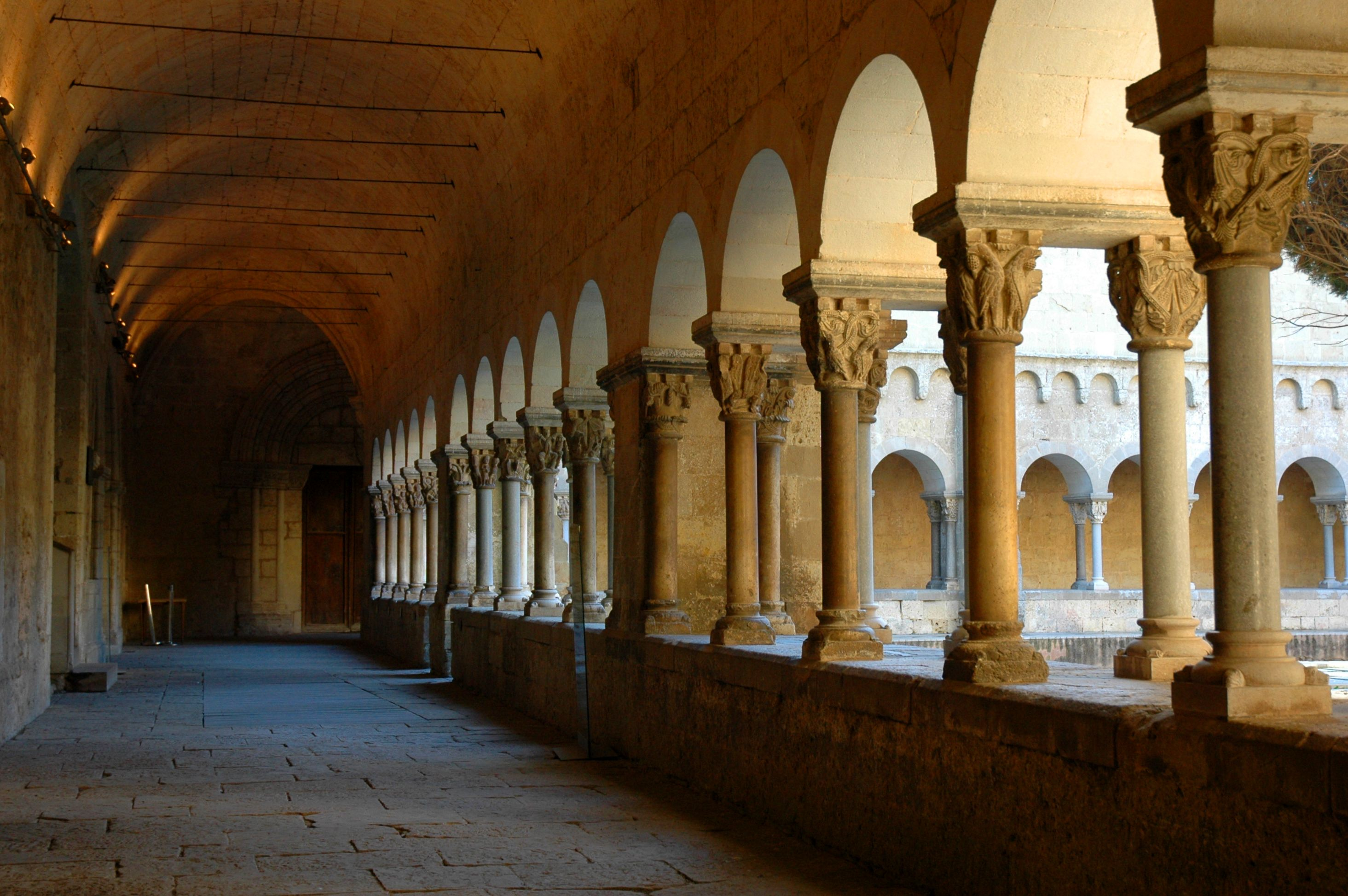 Monestir de Sant Cugat - Claustre galeria de llevant